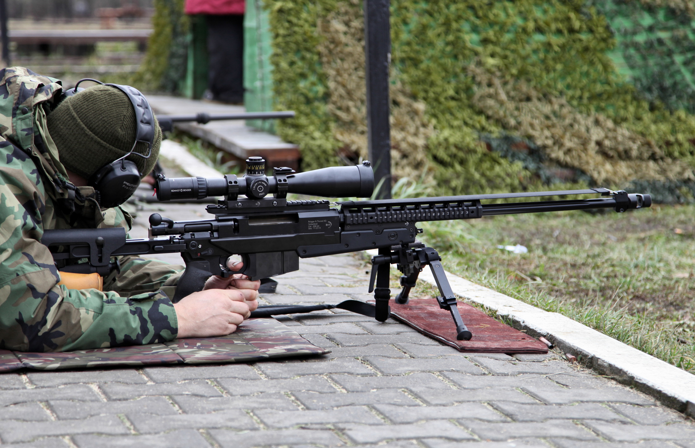 Brugger & Thomet APR 338